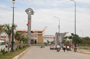 Moc Bai Border, Vietnam